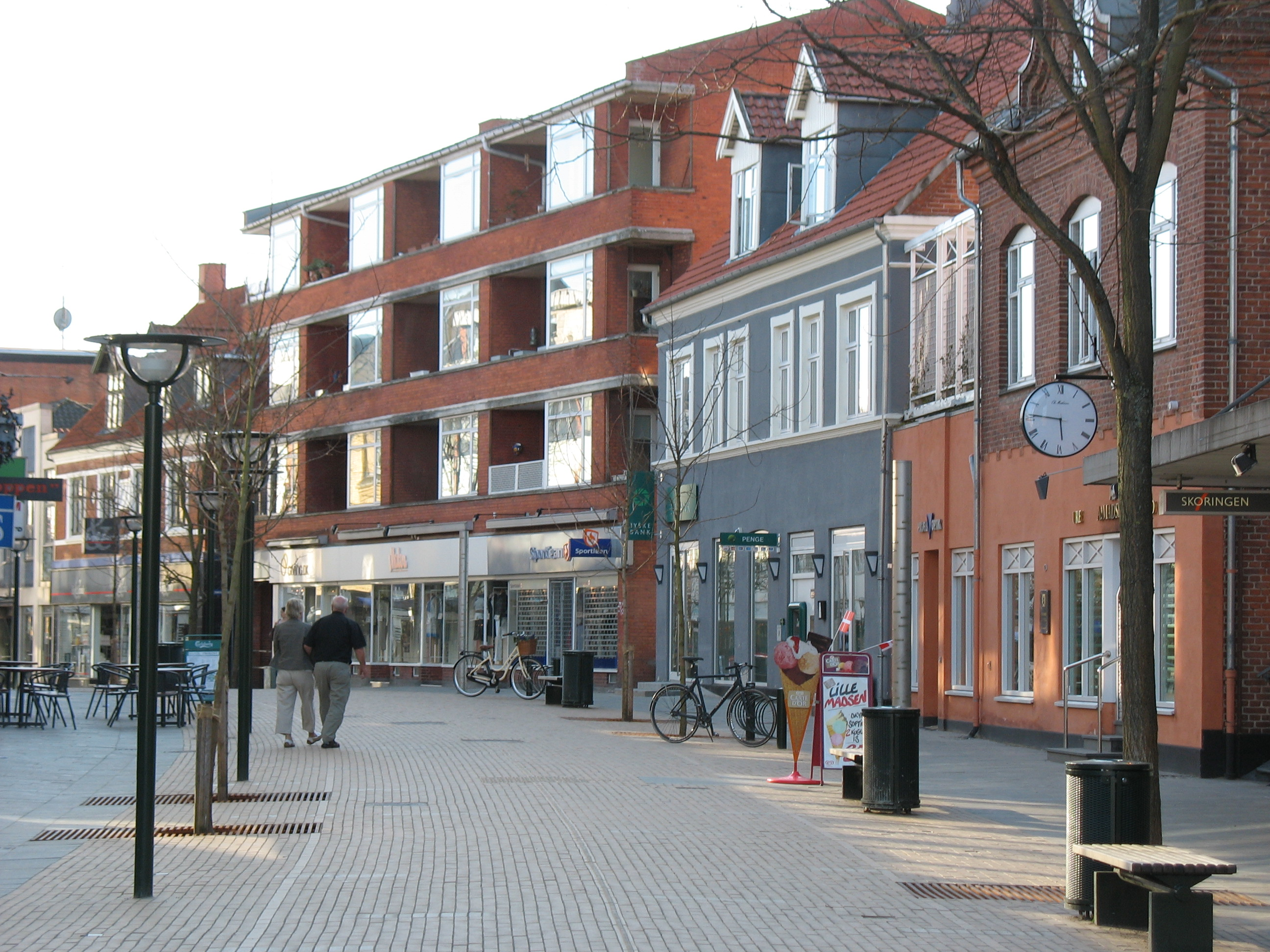 Hovedgaden i Birkerød